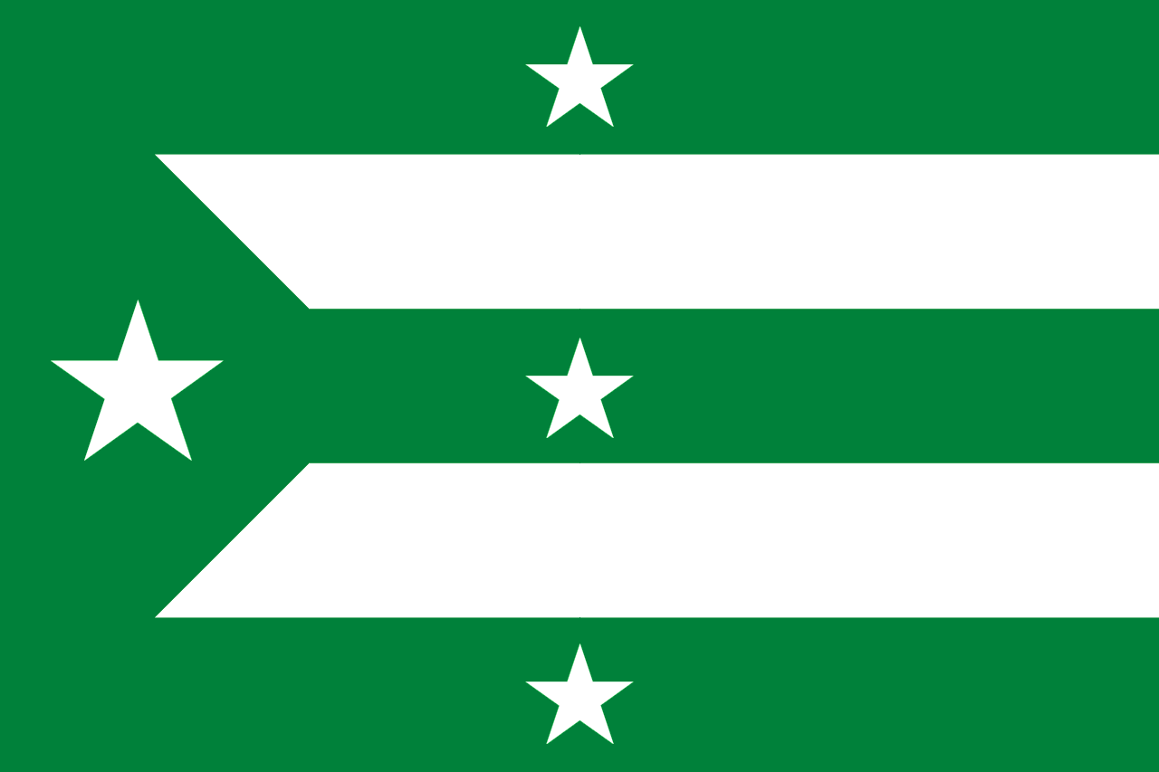 Bandera de Mira